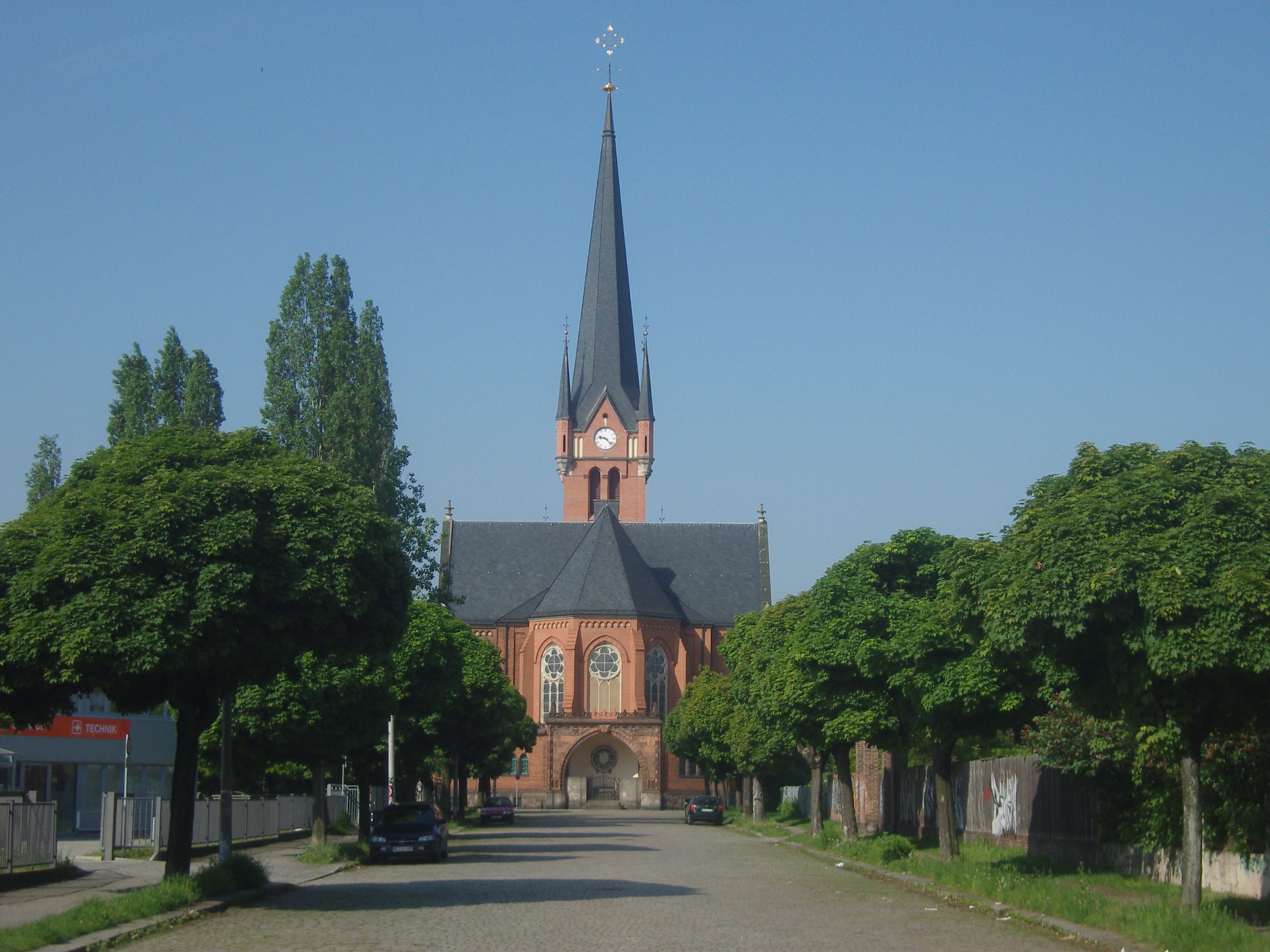 Rückansicht der Petrikirche in Dresden